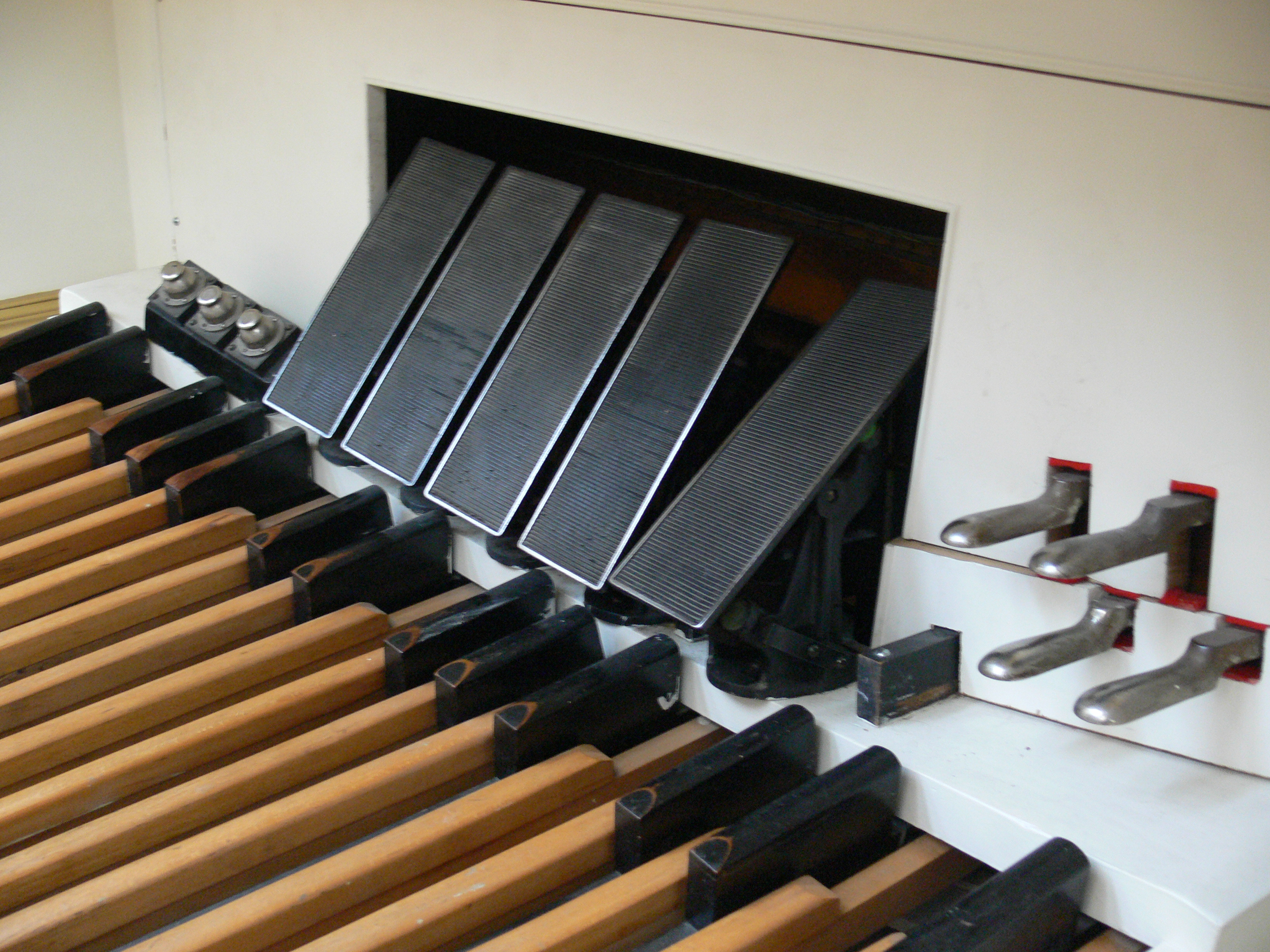 Mighty Wurlitzer, Musikinstrumenten-Museum Berlin Console: Pedals